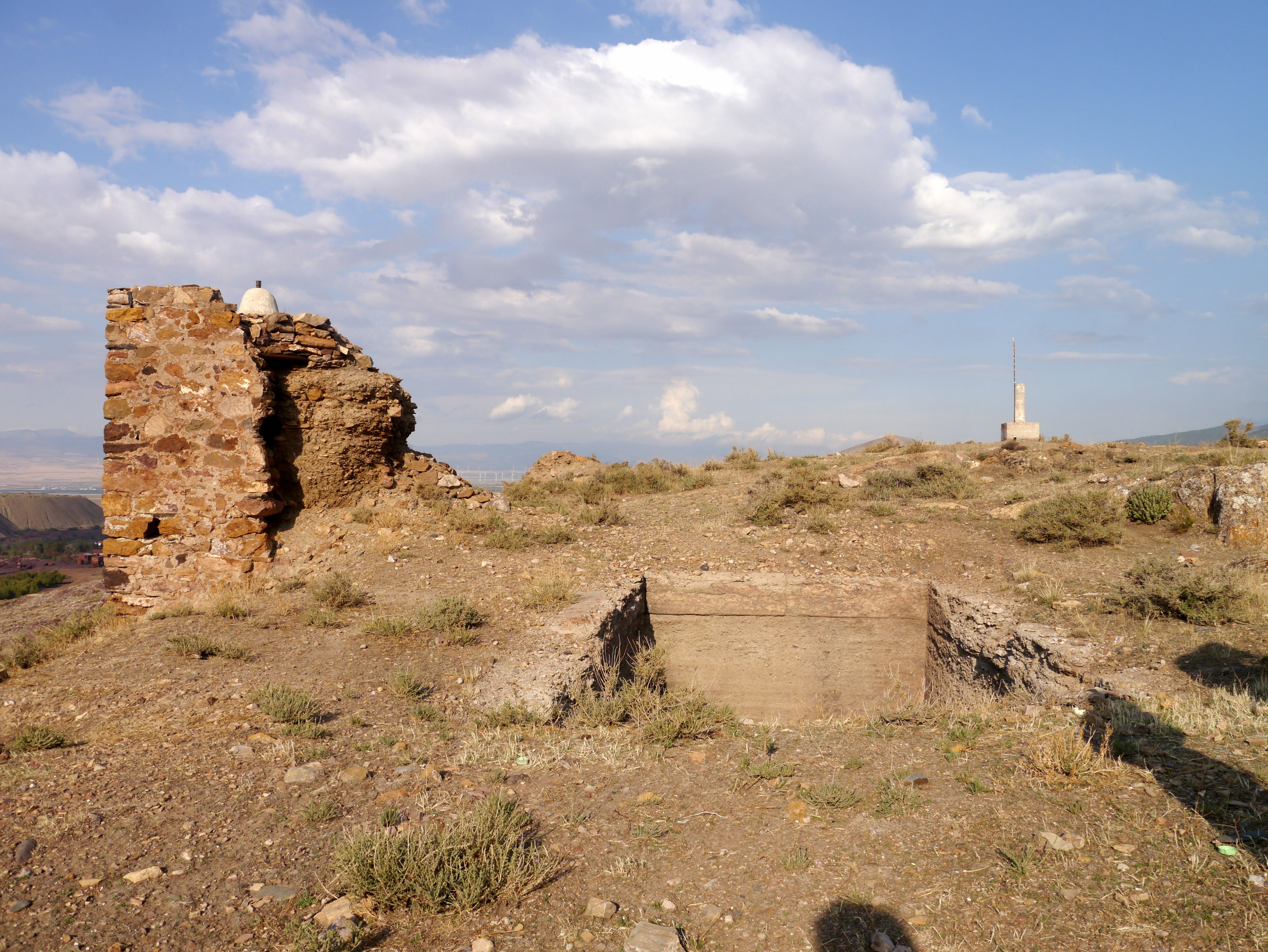 Castillo Medieval